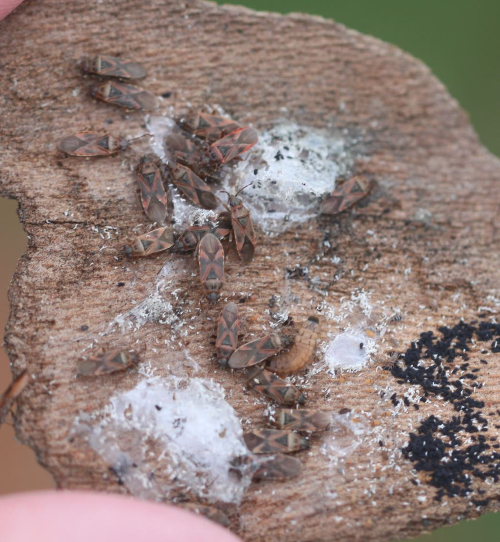 Wanzen Arocatus longiceps und eine unbekannte Käferlarve unter der Rinde einer Platane; am 6. Dezember 2019 in Walldorf/Baden